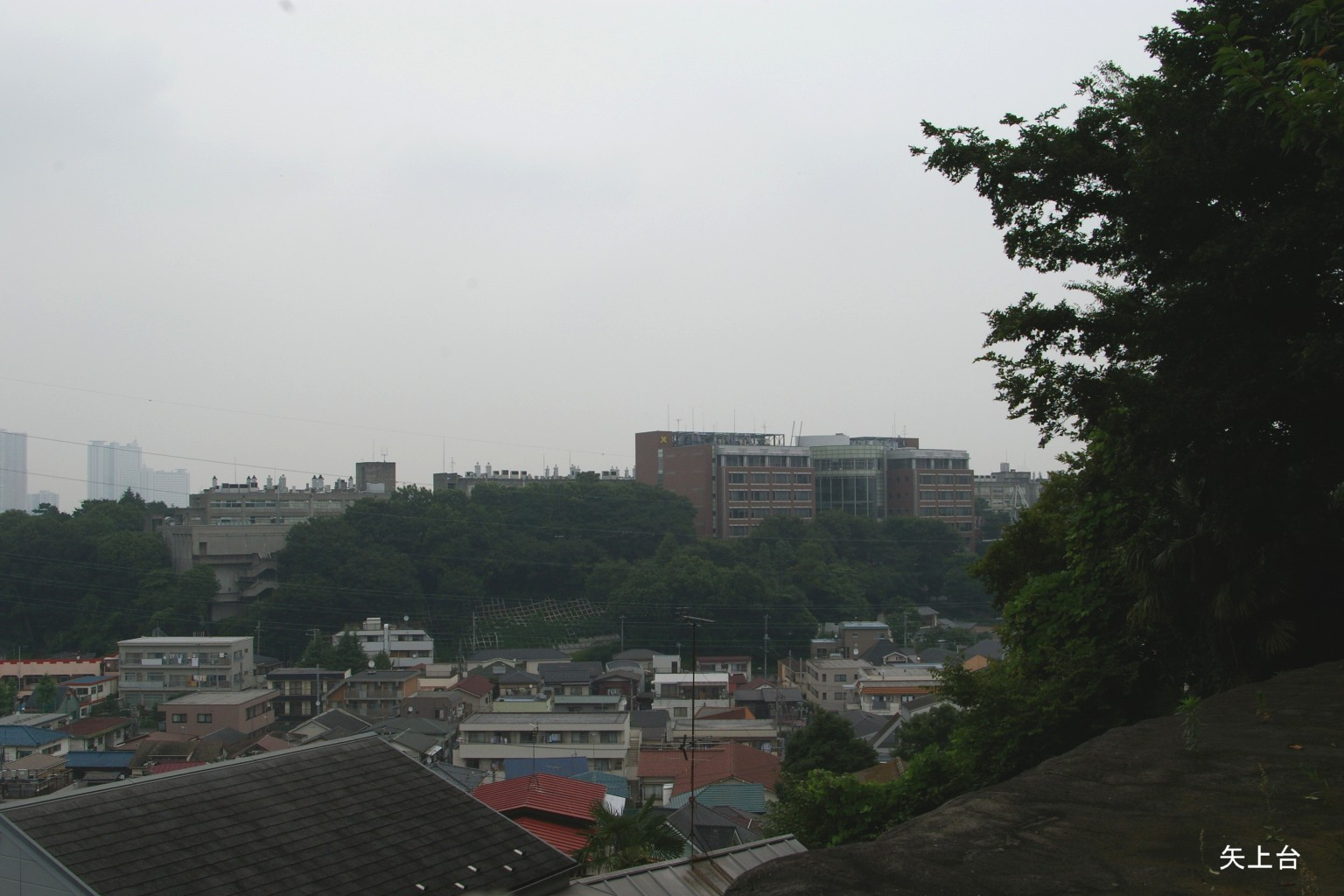 2009.5日本国内で塾生 (talk)が撮影。